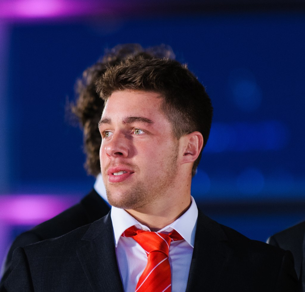 Rhys Webb. Wales Grand Slam Celebration, Senedd 19 March 2012 / Rhys Webb. Dathliadau Camp Lawn Cymru, Senedd 19 Mawrth 2012